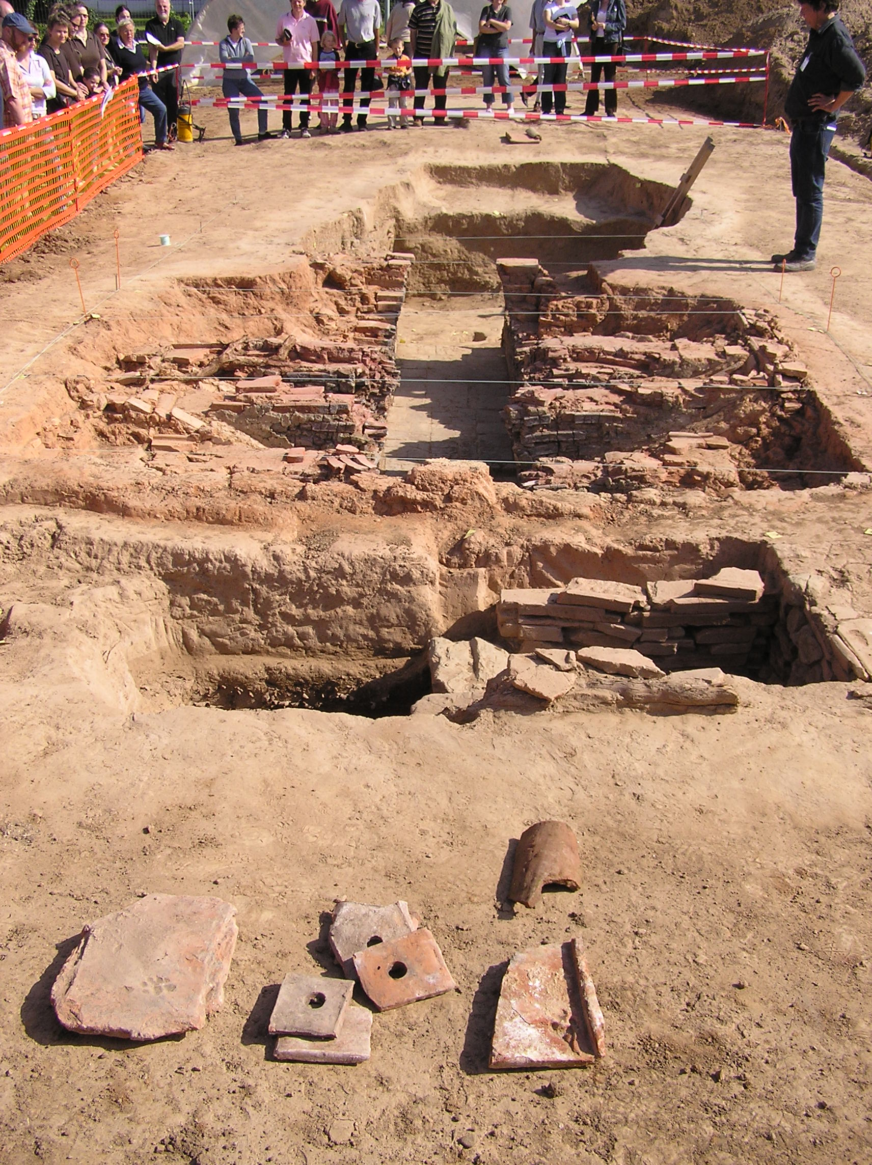 Der Ziegelbrennofen des vicus bonnensis (zivile römische Siedlung in Bonn). Im Vordergrund sind zerbrochene Wandheizungs- und Dachziegel zu sehen. Dahinter befindet sich die Anlage, von der die Mittel- und Seitenzüge erhalten sind. Die dahinter liegende Arbeitsgrube diente zur Bedieung des Ofens. Das Brenngut lagerte auf der (nicht mehr erhaltenen) Lochtenne und wurde ursprünglich von einer Kuppel oder ähnlichem abgedeckt.